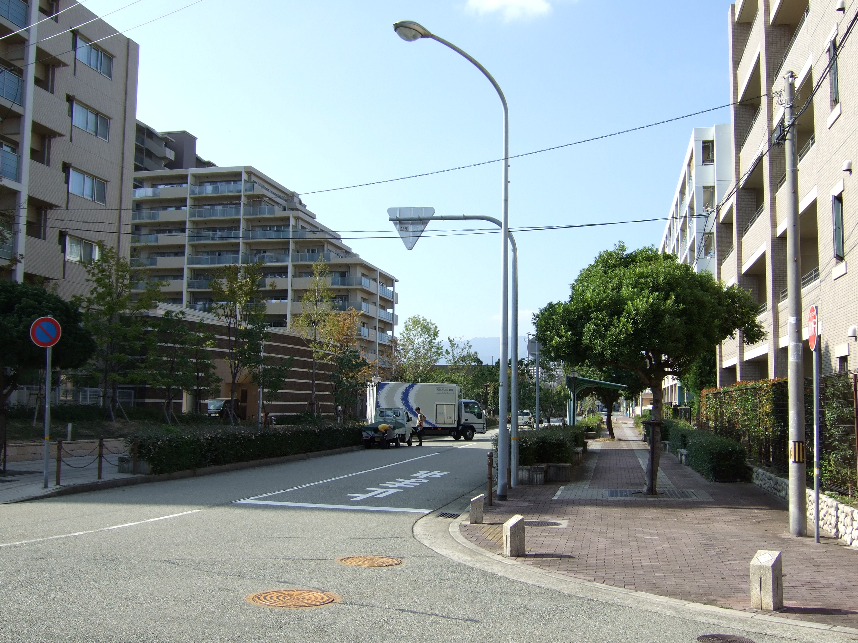 かつて甲子園競輪場だった分譲マンション（左側）。道路右側歩道にある屋根の部分が、かつて運行されていた甲子園駅ゆき無料送迎バス乗り場。トラックが停まっているその奥辺りが、かつての正門の位置。歩道にある小さな出っ張りがモニュメント。.